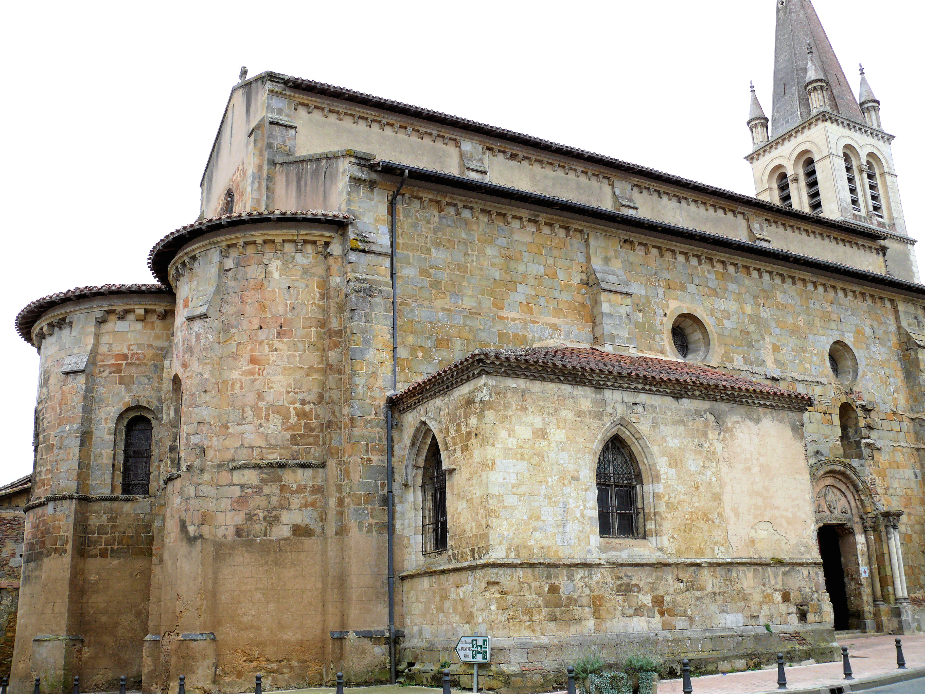 Nogaro - Collégiale Saint-Nicolas - Ensemble